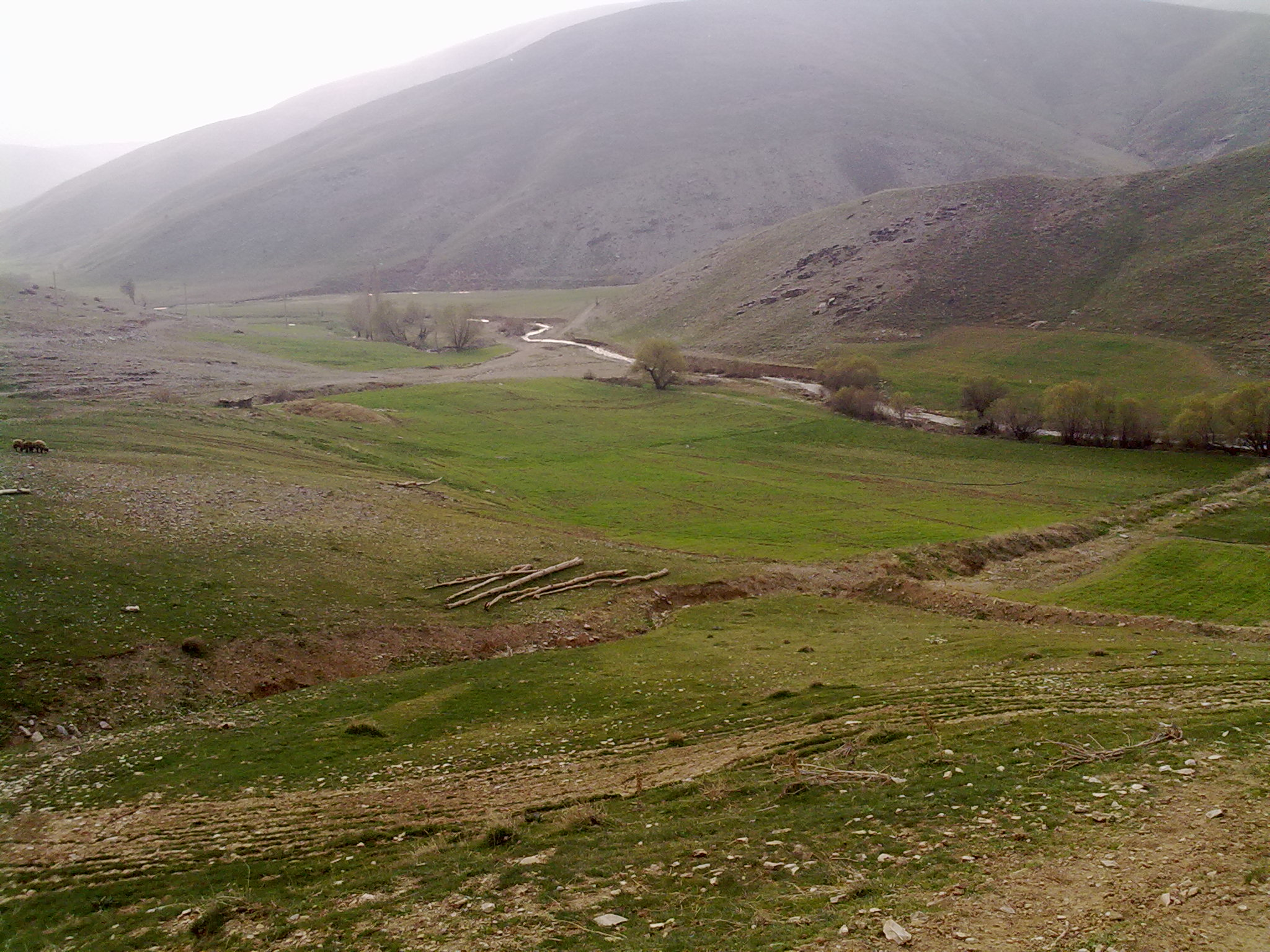 نمای پایین دست روستای بهرام آباد